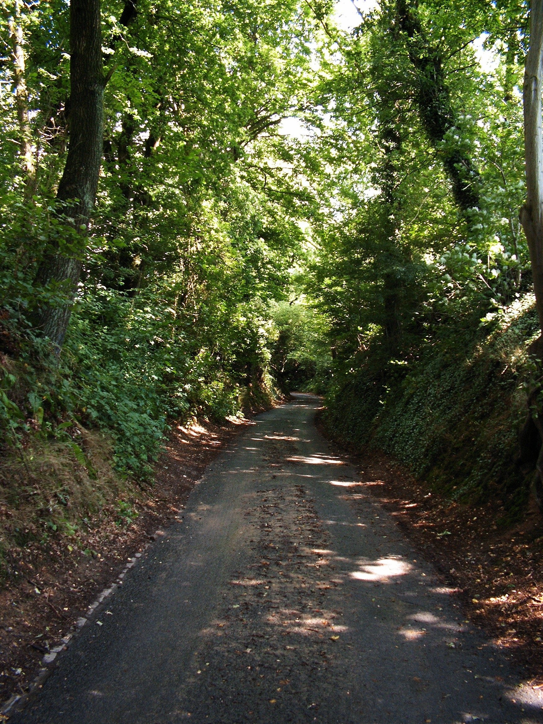 Sonbeck: Hohlweg Dassendahl